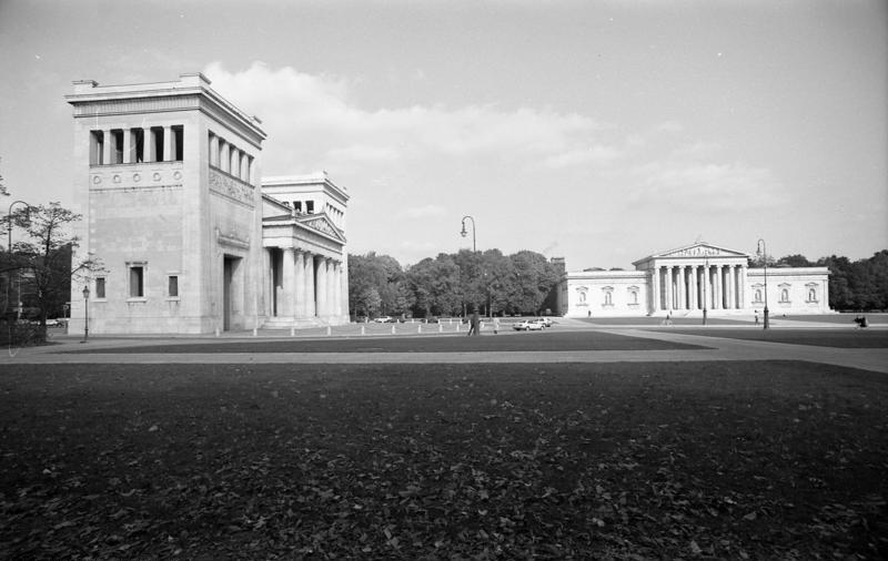 22.10.1991 München, Königsplatz